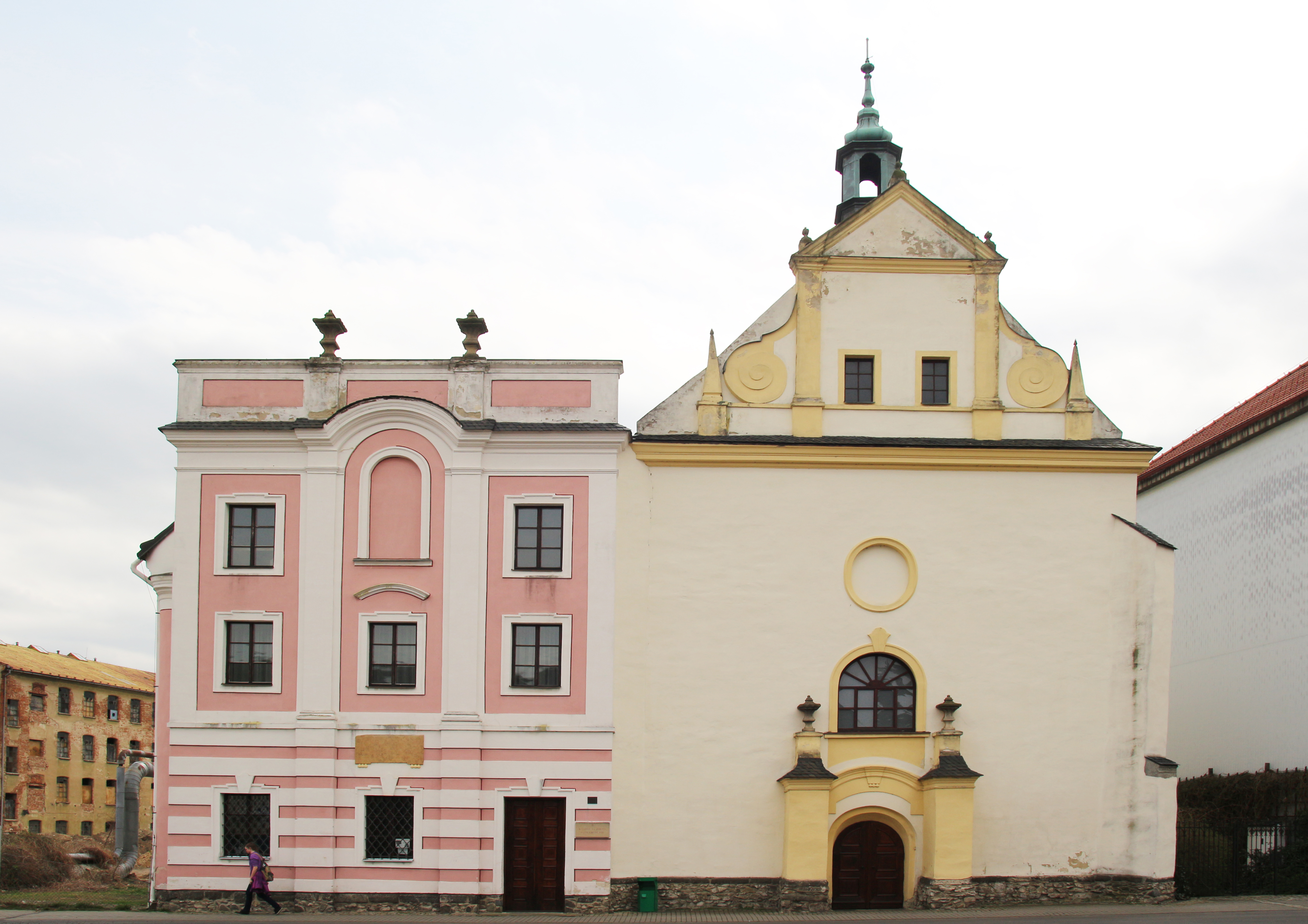 Čelní fasády špitálu a kostela sv.Ducha v Krnově